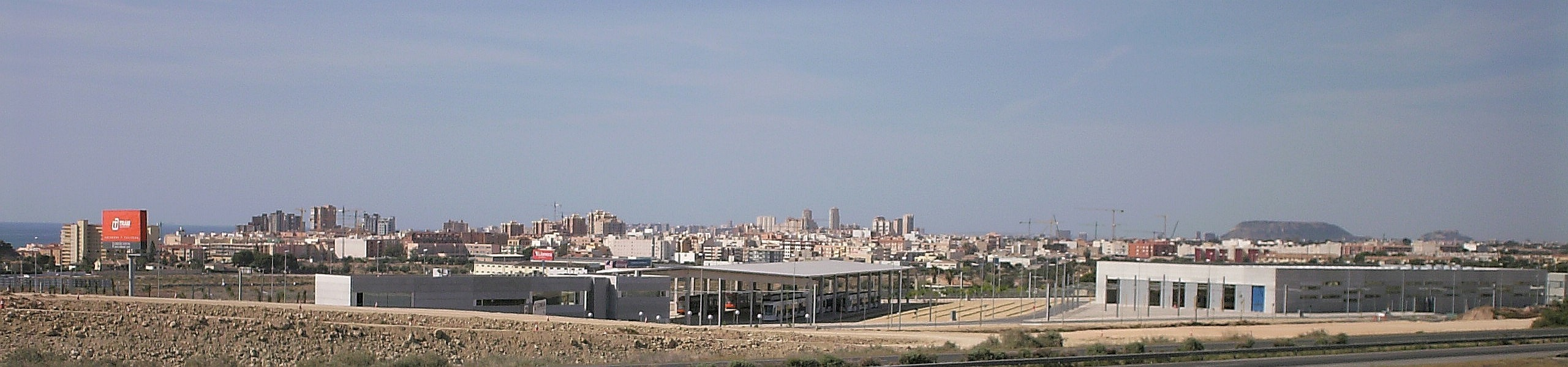 Zentralwerkstatt der Stadtbahn Alicante in El Campello / Cocheras y Talleres del TRAM Metropolità d'Alacant en El Campello